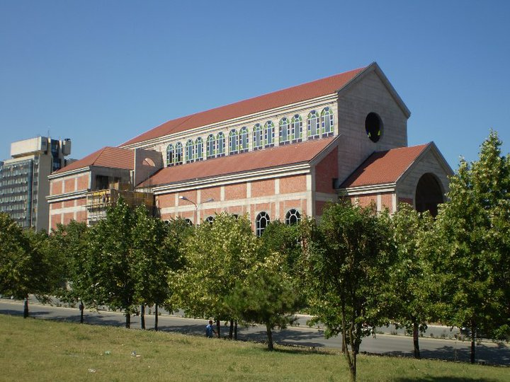 Kathedrale in Prishtina